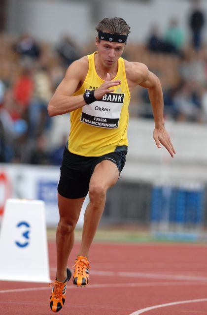 Arnoud Okken during Dutch Championship 2007 in Amsterdam